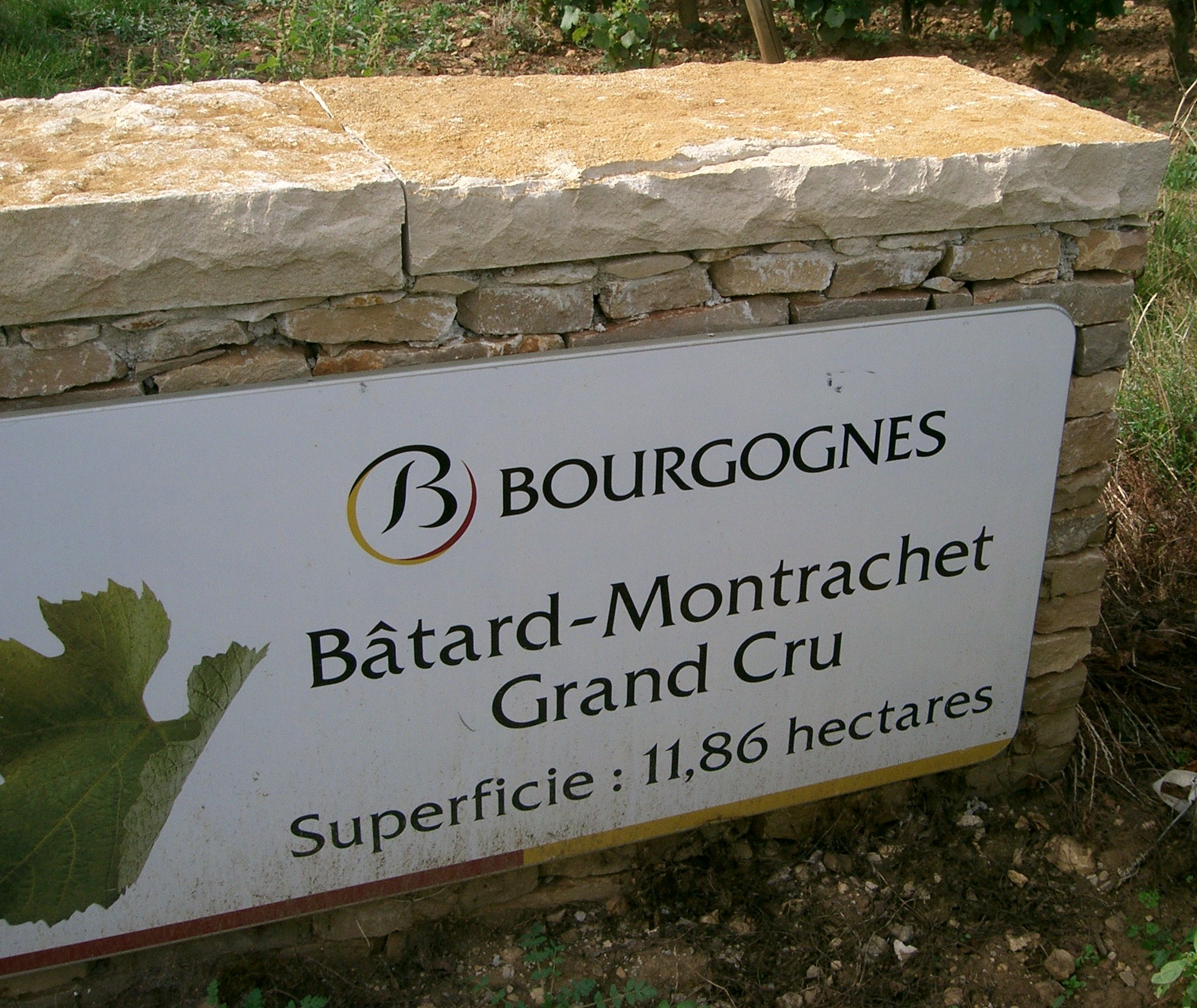 panneau sur la voie des vignes : Bâtard-Montrachet (Bourgogne)